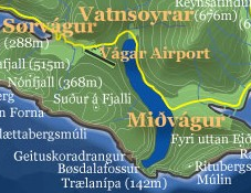 Sørvágsvatn